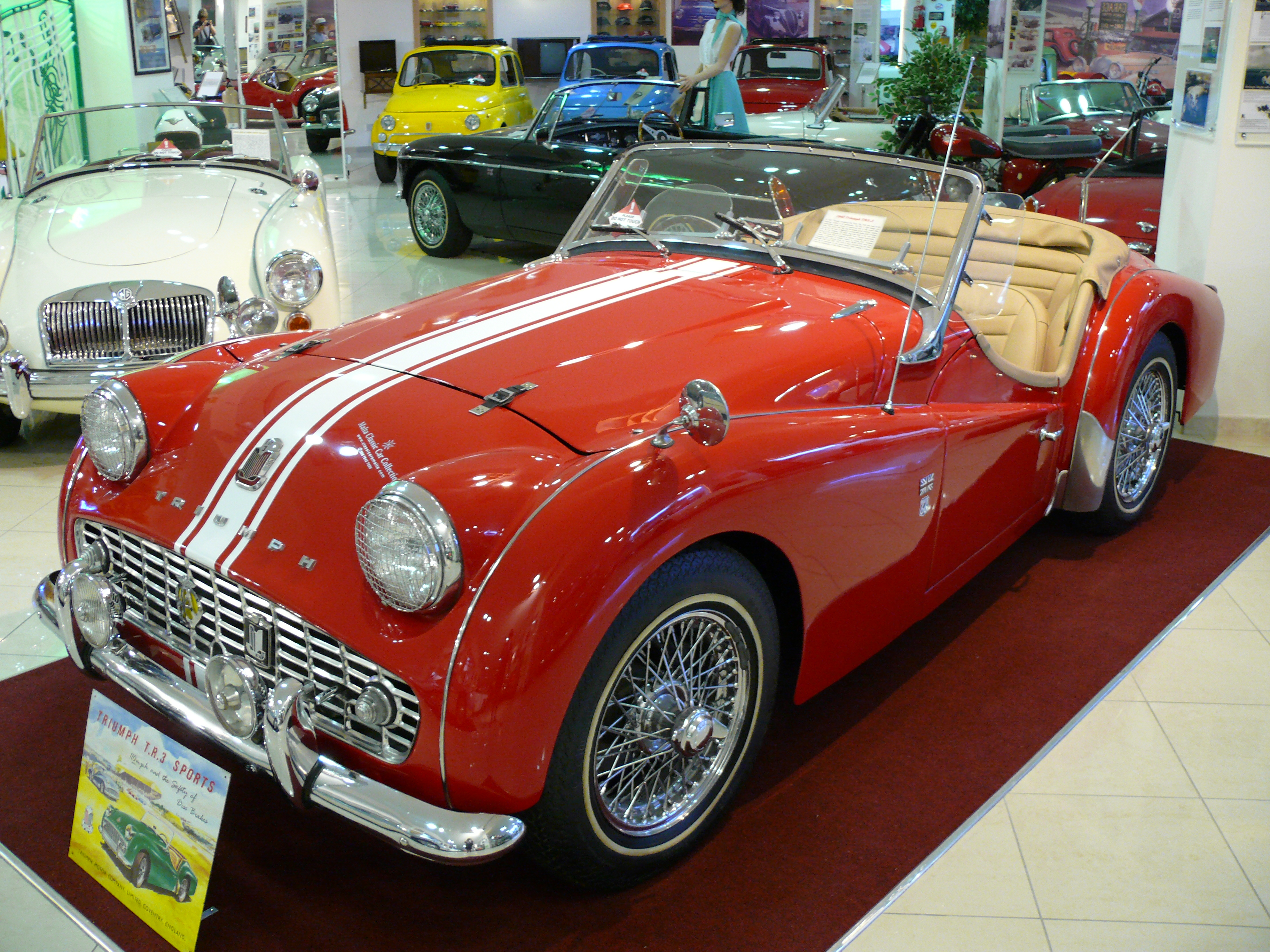 Triumph TR3A, Malta Classic car Museum